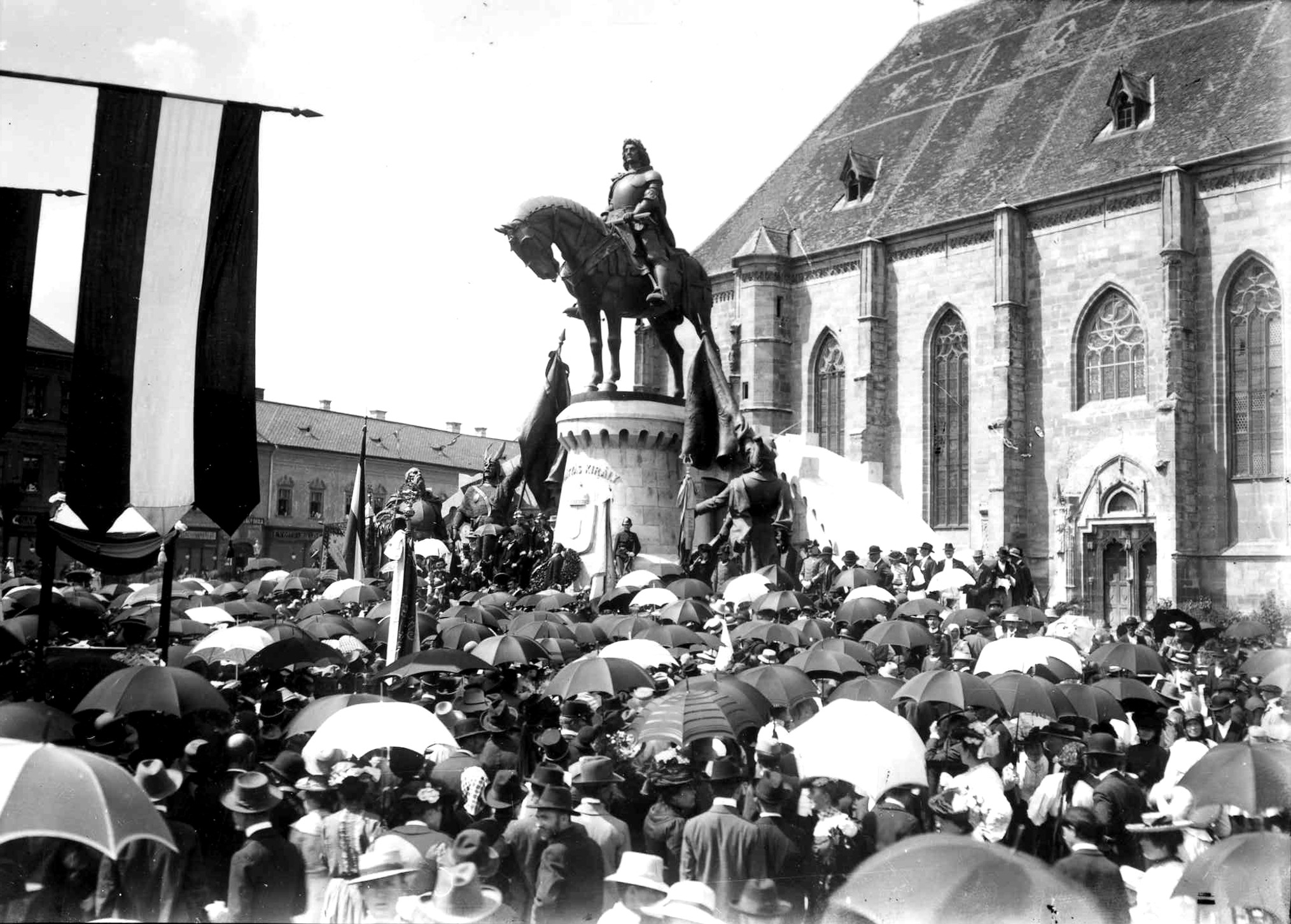 Korabeli kép Fadrusz alkotásának 1902. október 12-i felavatásáról